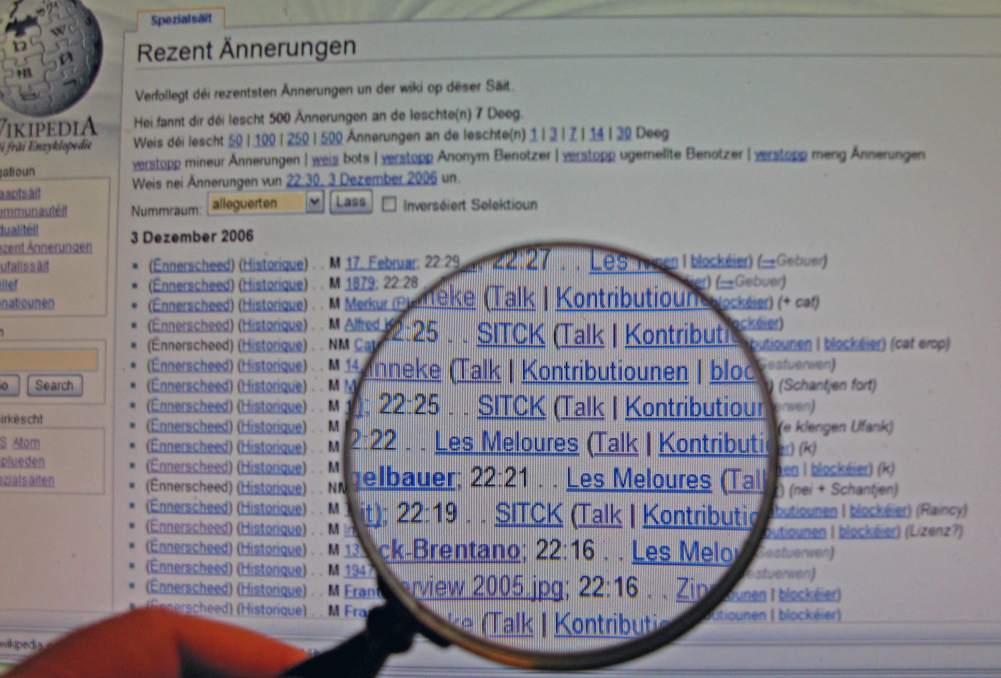 Ronn Lupp.